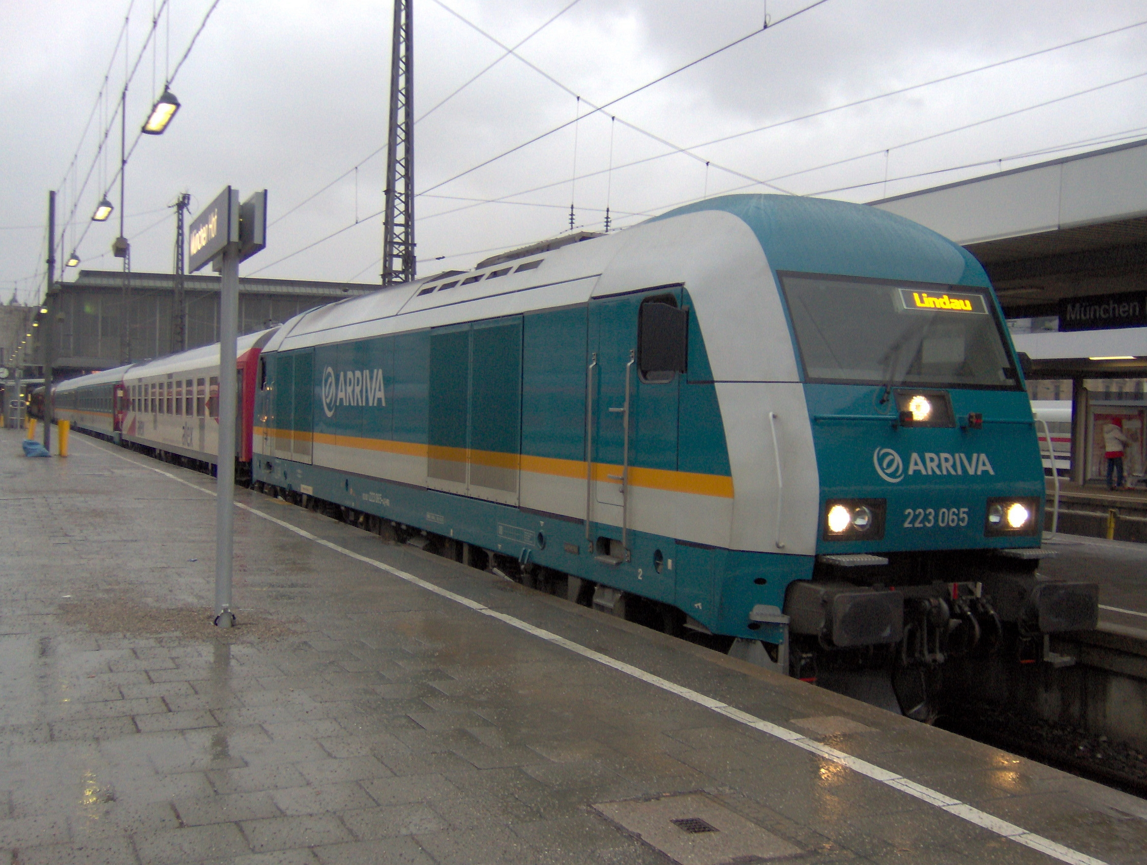 Eine Lok 223 der Länderbahn Bahngesellschaft im Hauptbahnhof München zur Fahrt nach Lindau